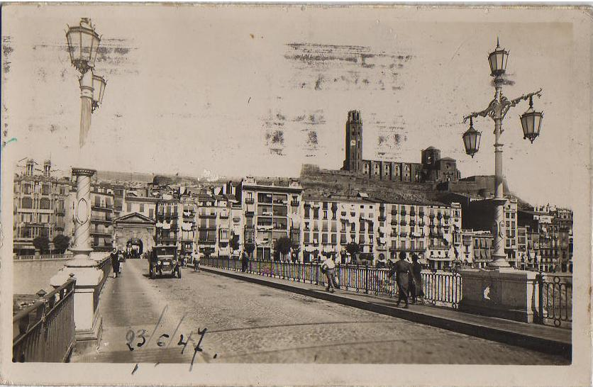 Lleida